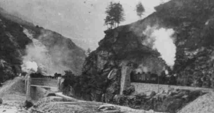 Aufnahmen von Güterzügen der GB sind selten. Ein schwerer Güterzug mit Vorspann- und Schiebelokomotive überquert auf seiner Fahrt nach Norden die Polmengo-Brücke und durchfährt den Boscherino-Tunnel.